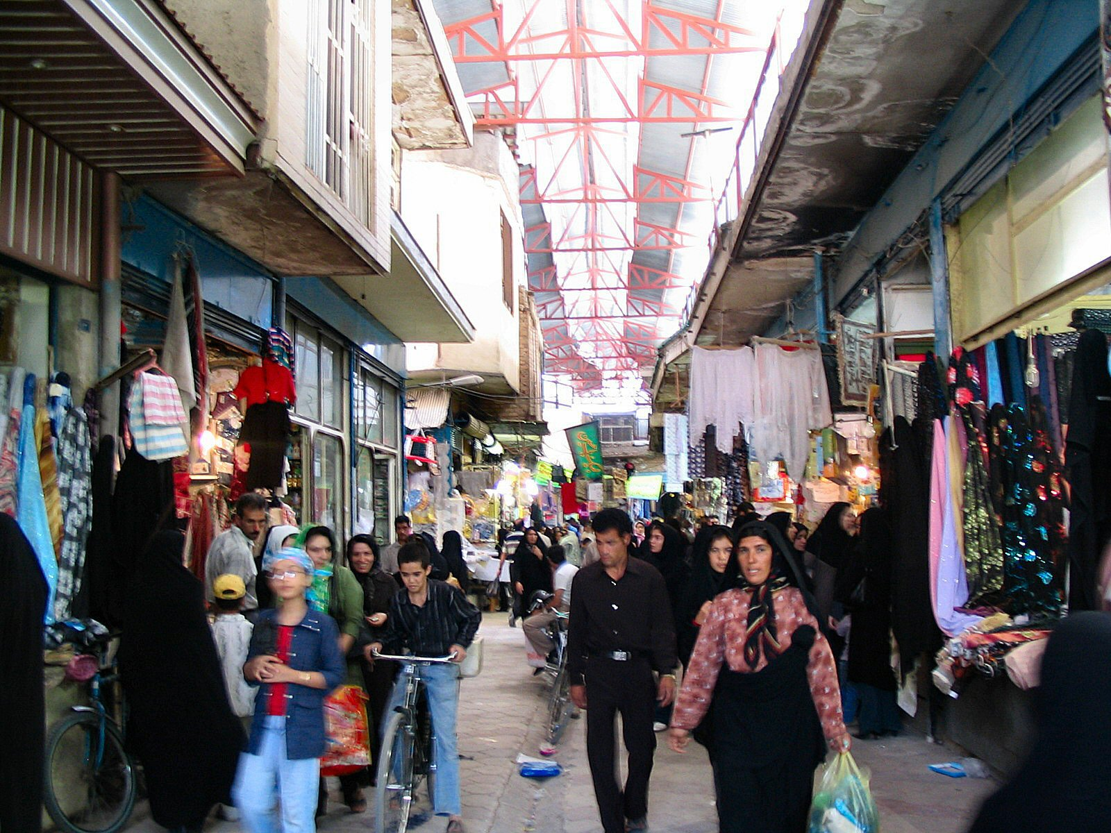 Bazaar of Borujerd